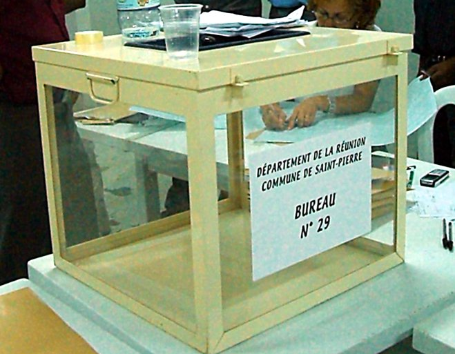 ballot box // Wahlurne // Urne électorale